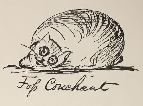 愛德華·利爾的畫作〈俯臥的弗思〉，摘錄自《荒誕的歌和故事》。現藏於大英圖書館